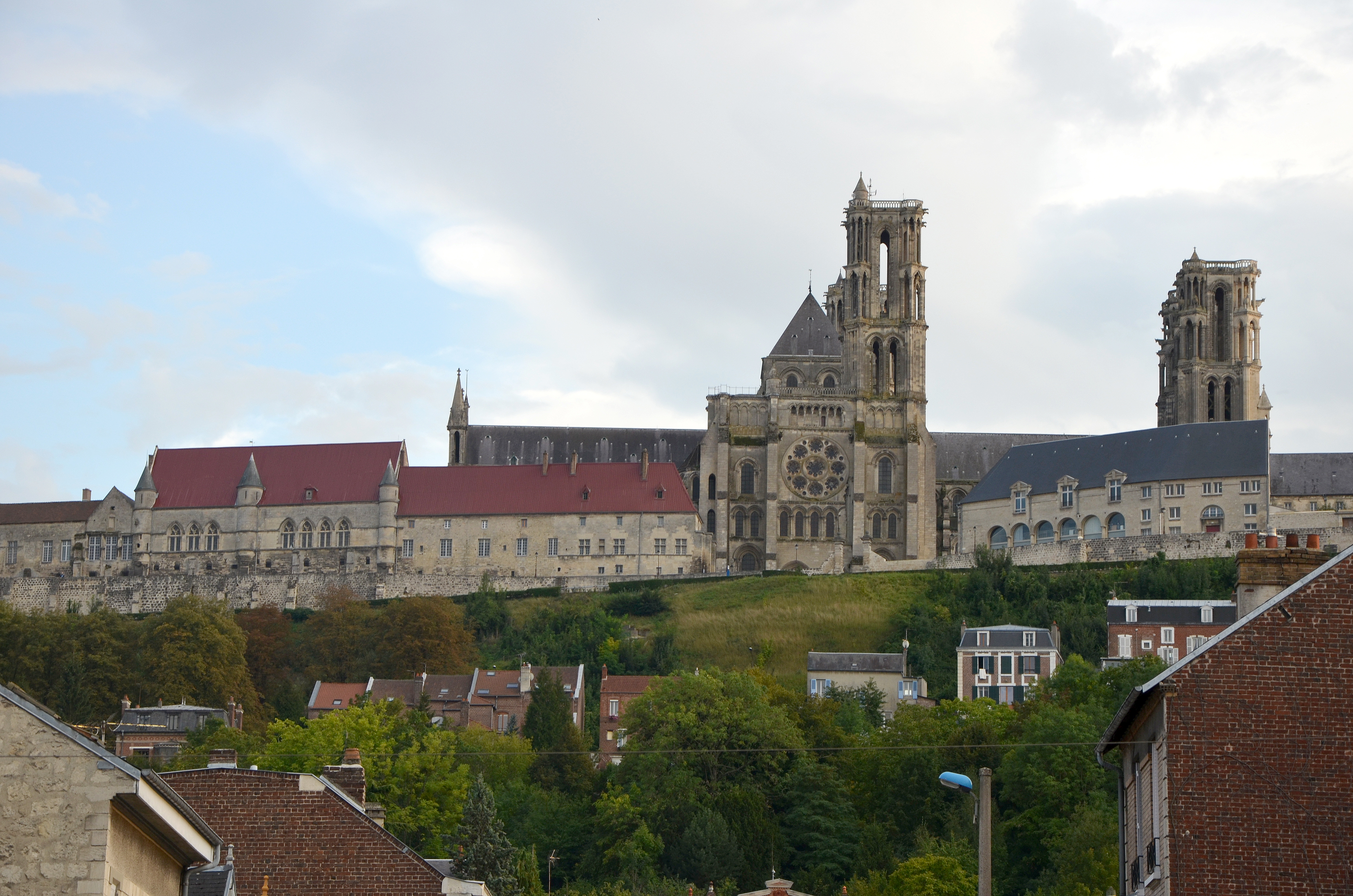 De droite à gauche l'Hotel Dieu, la cathedrale et le palais épiscopal de Laon (Aisne, France) vus depuis la partie basse de la ville située environ 100 mètres en contrebas.